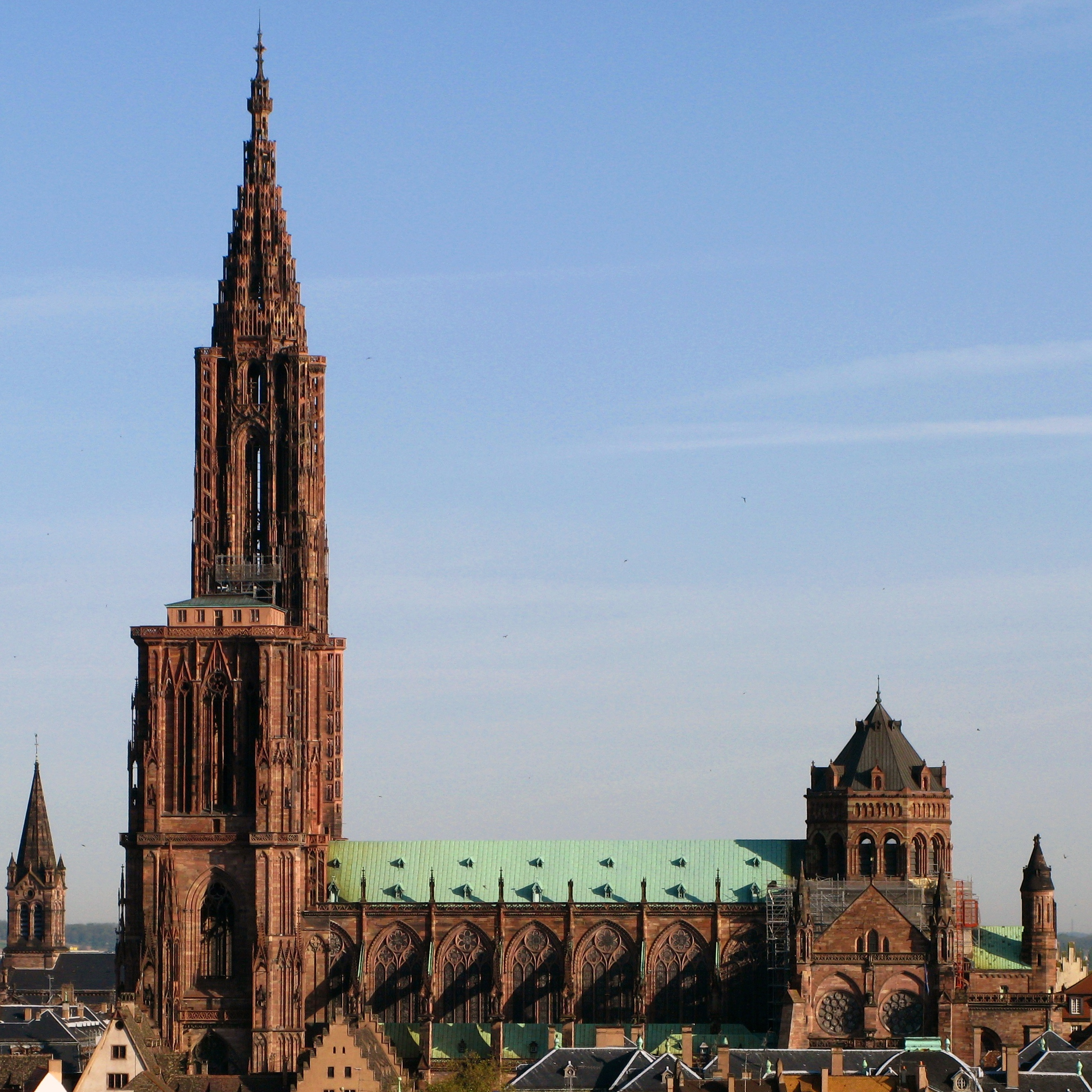 La cathédrale Notre-Dame de Strasbourg, France.